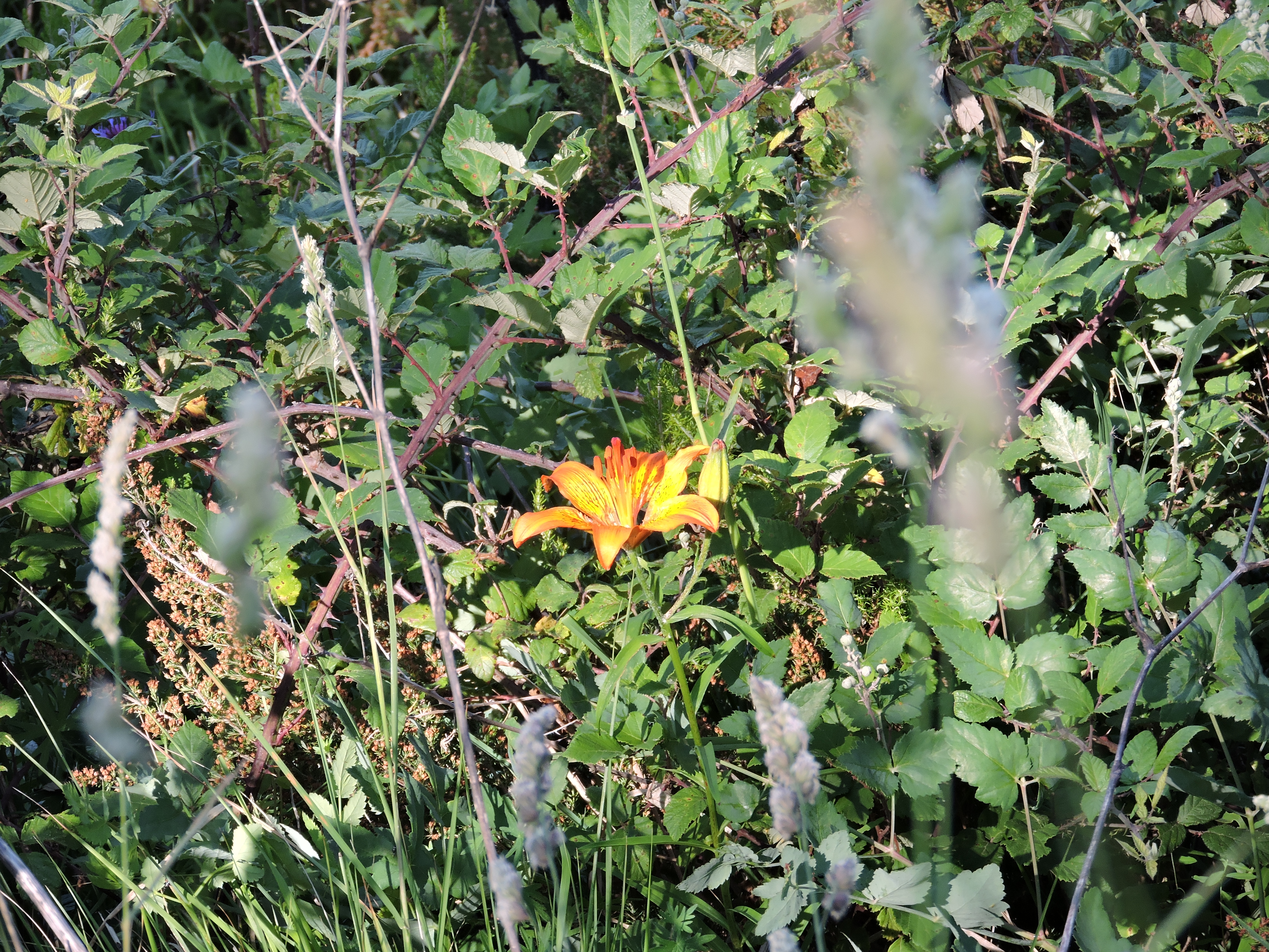 Un giglio montano arancione sul Monte Pegge.